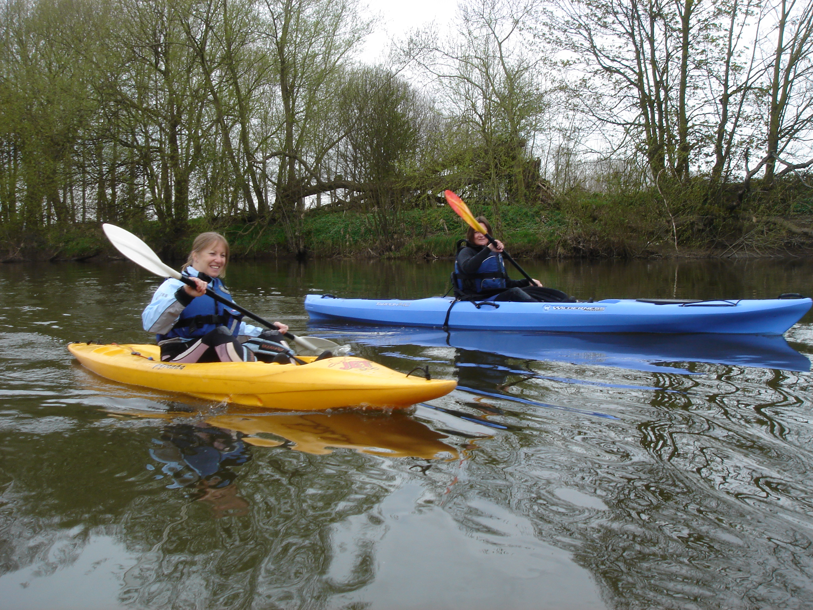 Wye Kayaking